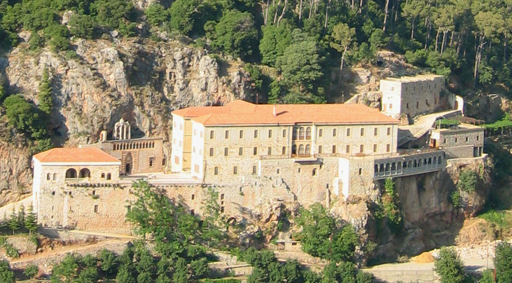 Qozhaya01072003.jpg